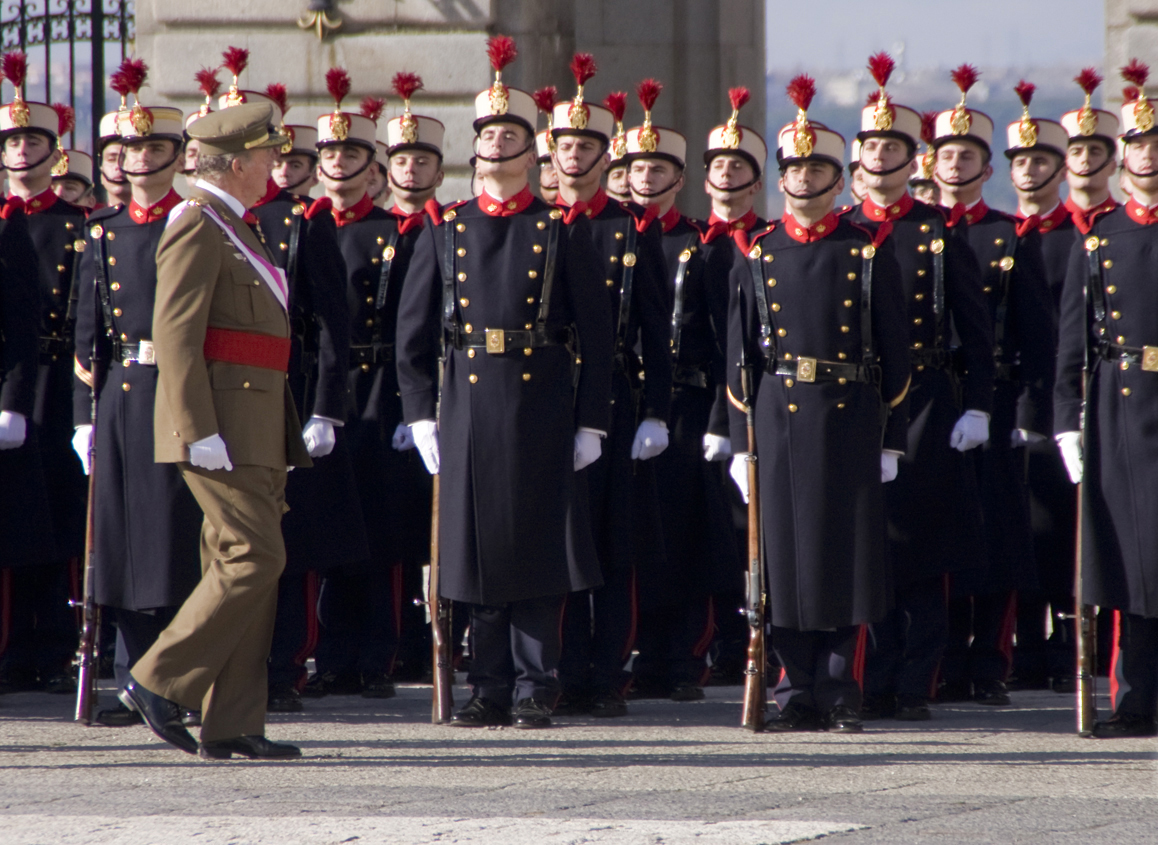 El rey Juan Carlos en la Pascua Militar de 2009, en la Plaza de la Armería del Palacio Real de Madrid.